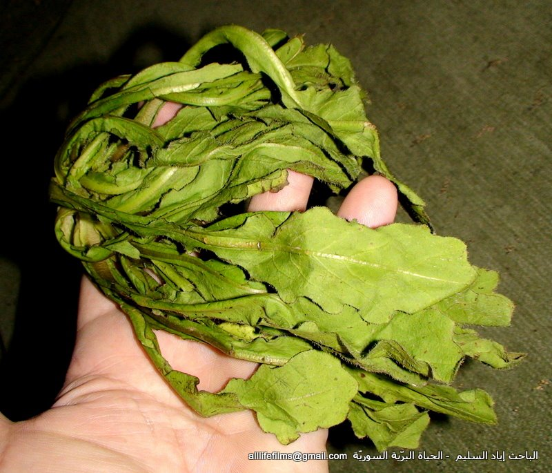 نباتات برية سورية تؤكل